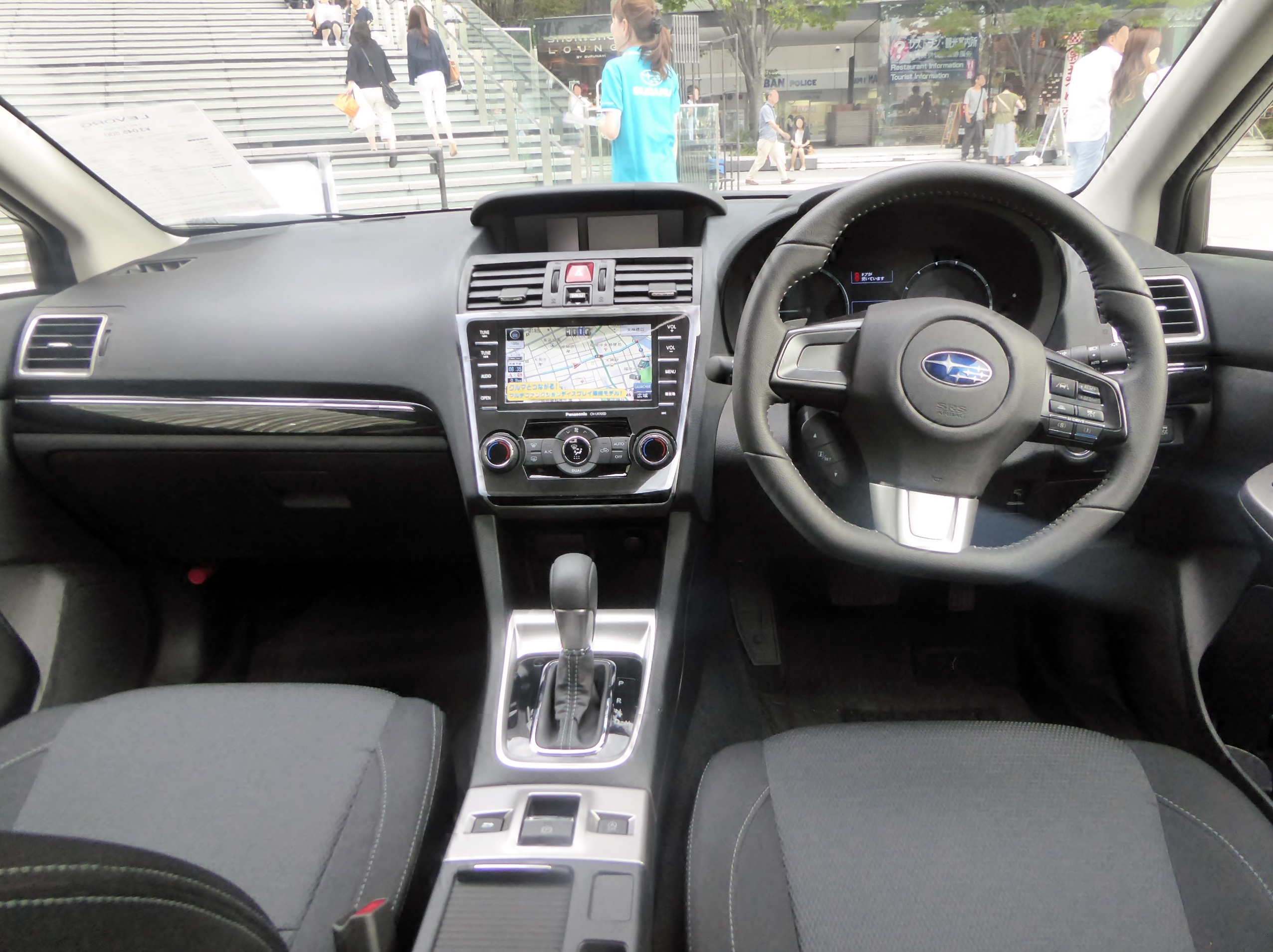 VM4型スバル・レヴォーグ1.6GT EyeSightのインテリアを撮影。